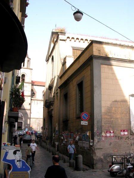 Napoli, chiesa della Croce di Lucca: prospetto